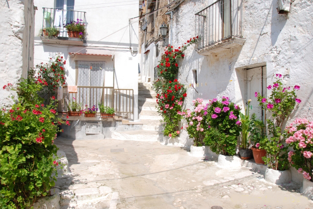 Wikipedia: Cagnano Varano